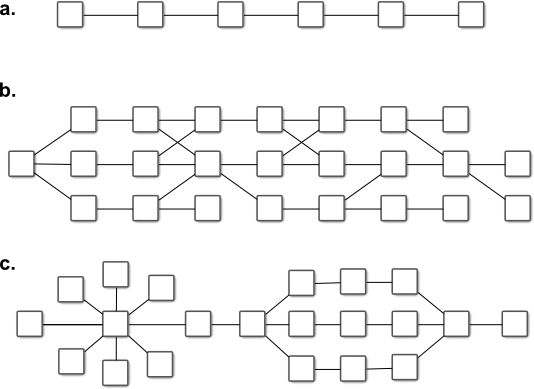 Différents schémas narratifs de jeux interactifs : jeux vidéos ou autre. A : linéaire, B : ramifié, C : collier de perles.